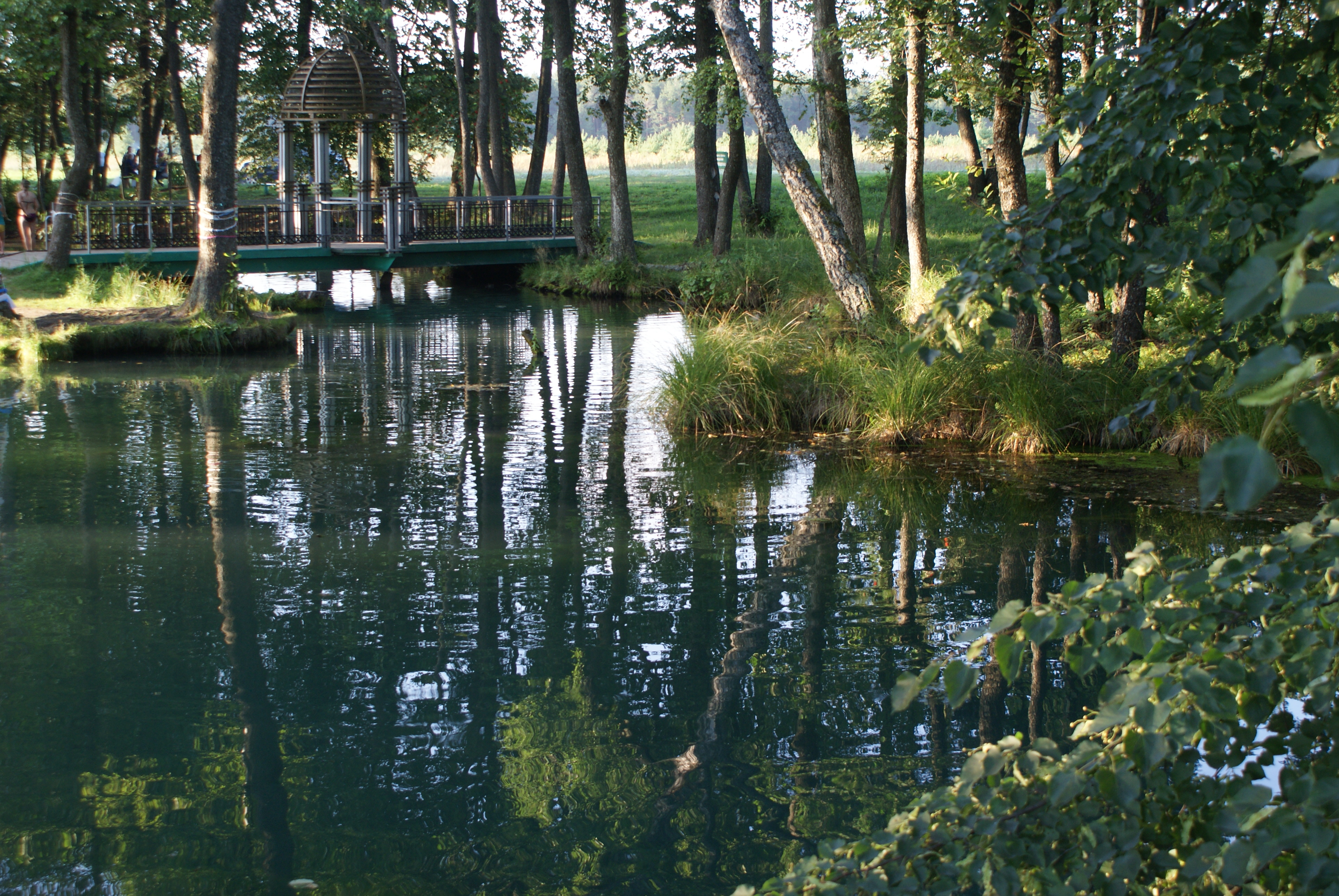 Блакітная крыніца